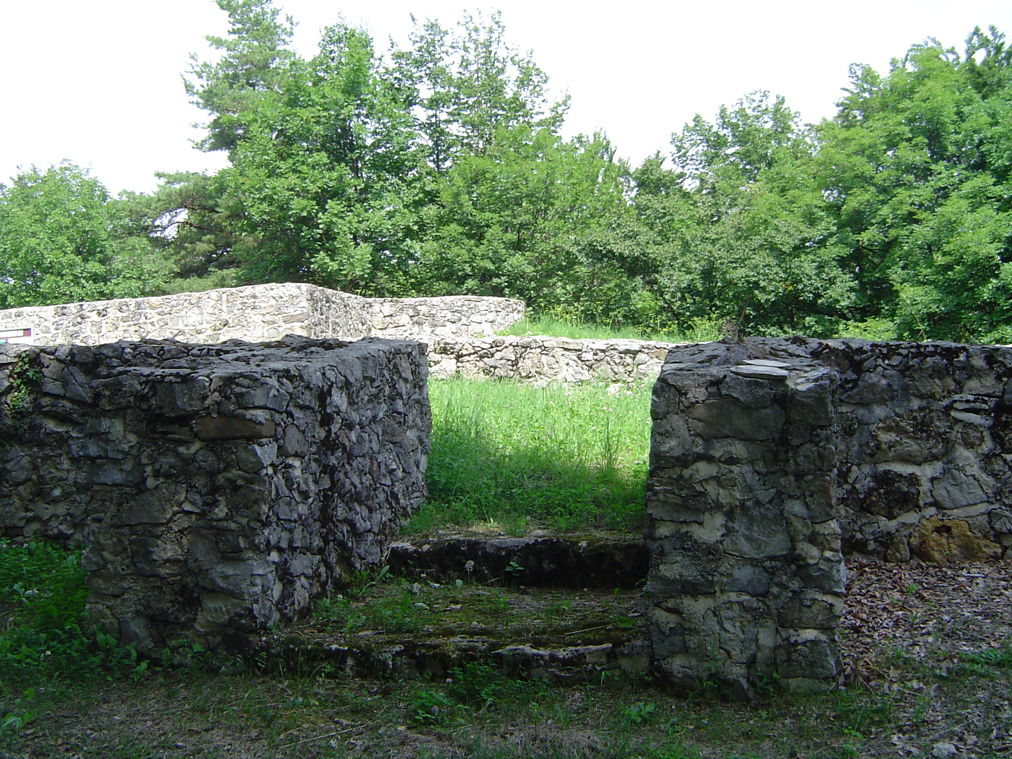 Ajdovski gradec near Sevnica, Slovenia